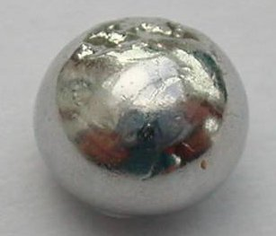 Bildbeschreibung: 1 g hochreines Ruthenium in Form einer Schmelzperle Quelle: selbst fotografiert, aus meiner Sammlung chemischer Elemente Fotograf/Zeichner: Tomihahndorf Datum: März 2006